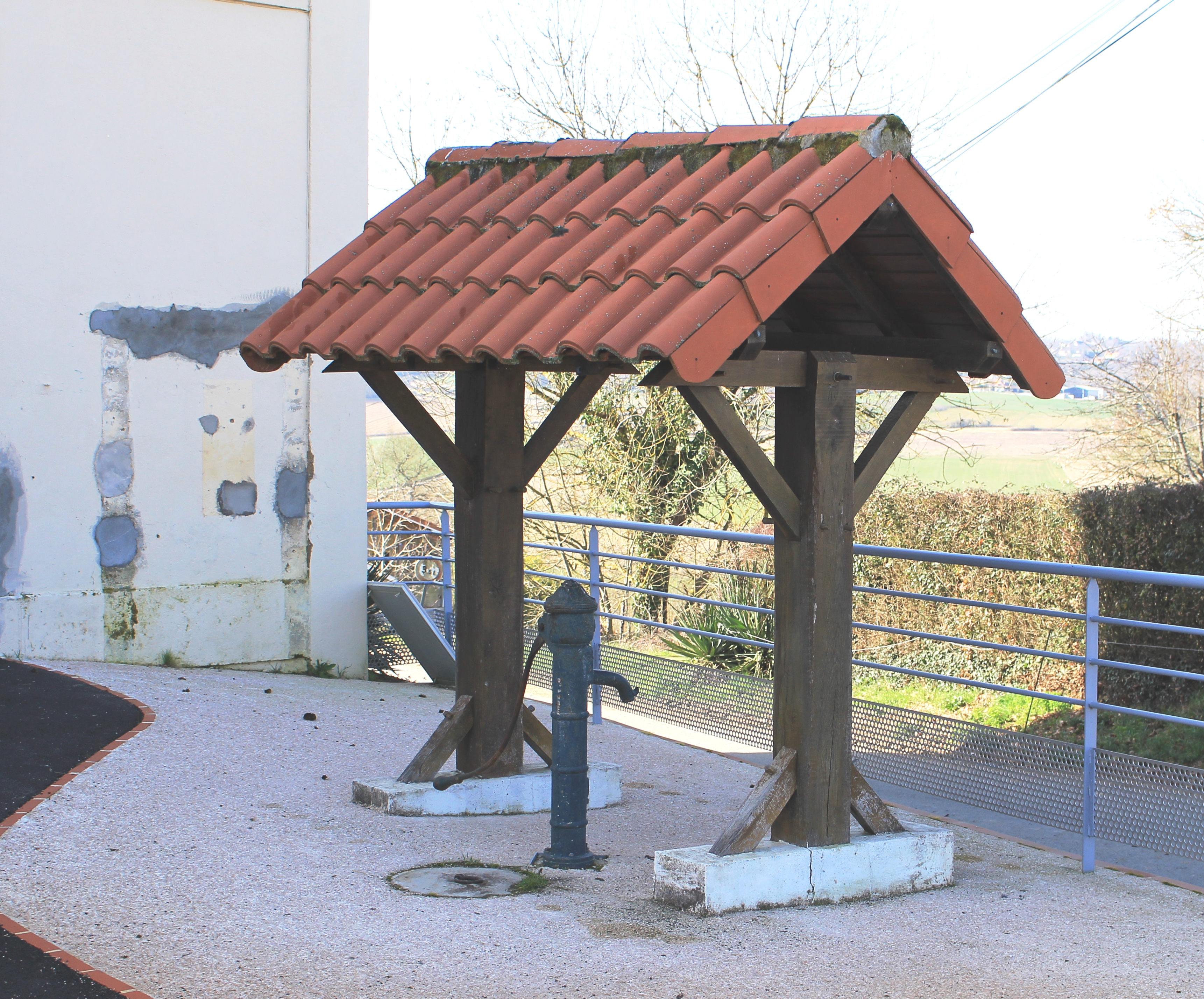 Fontaine de Jacque (Hautes-Pyrénées)